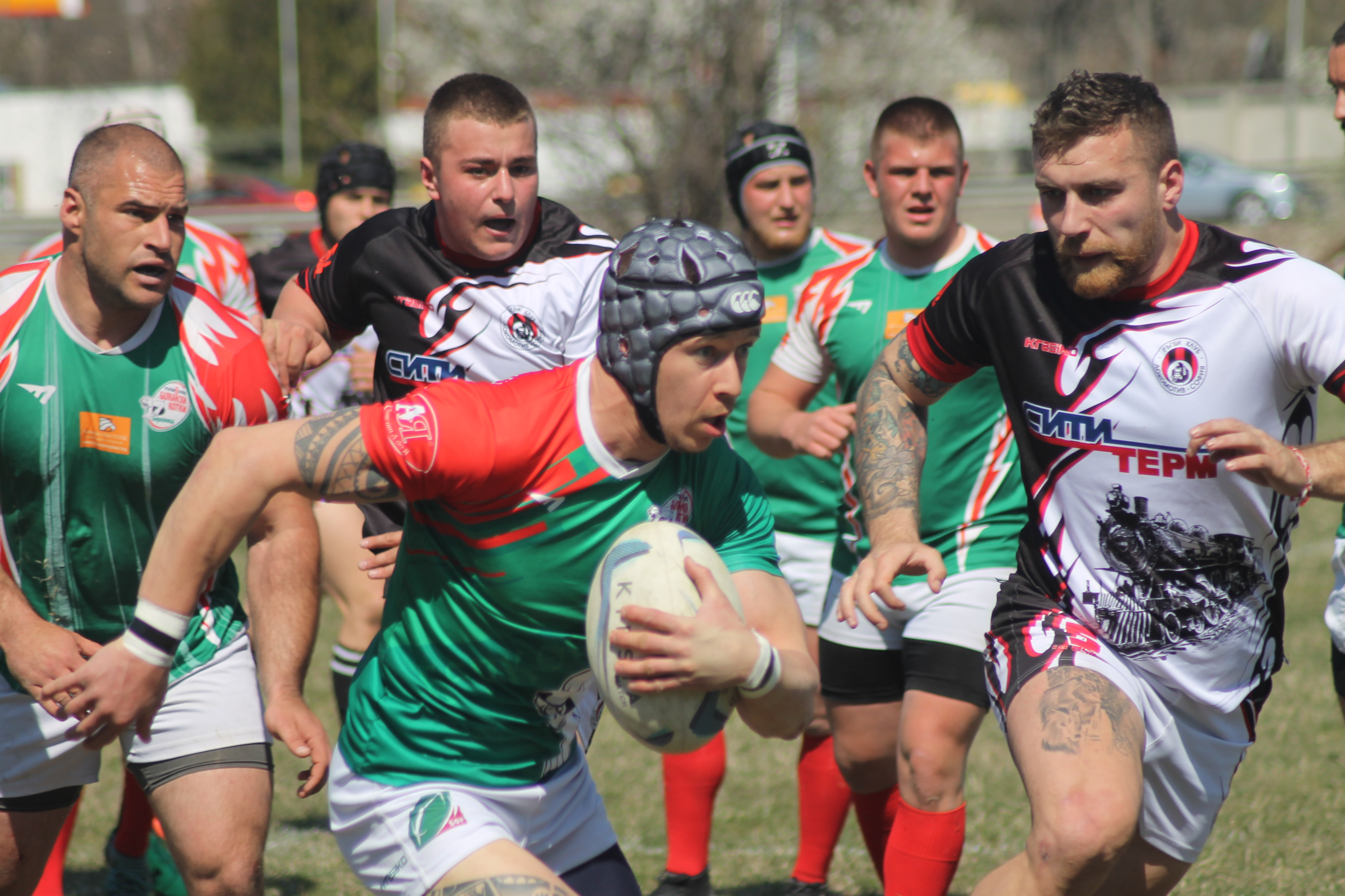 "Балкански котки" срещу Локомотив